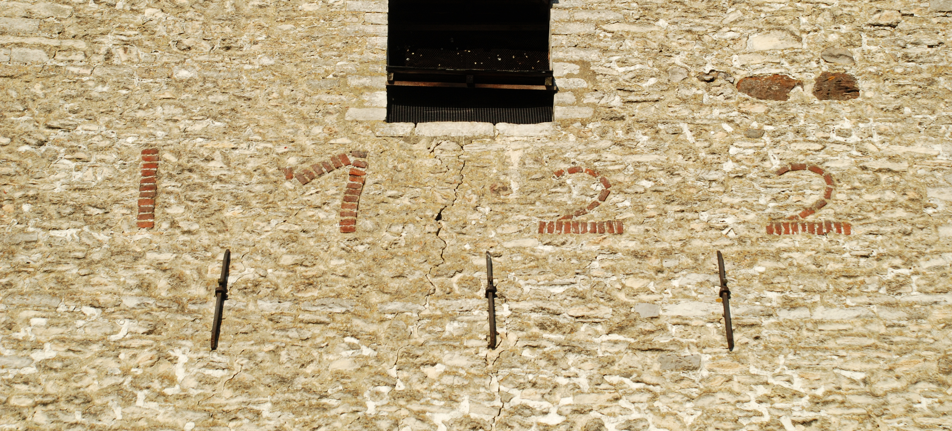 Belgique - Brabant wallon - Église Saint-Georges de Grez-Doiceau